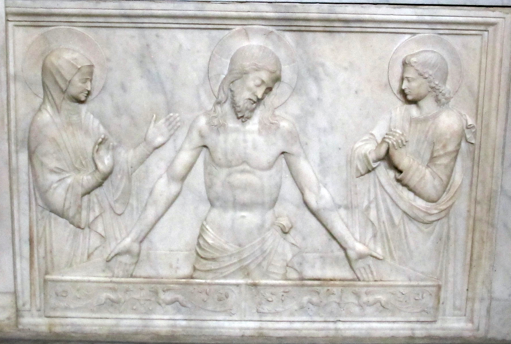 Sant'Anna dei Lombardi (Napoli)